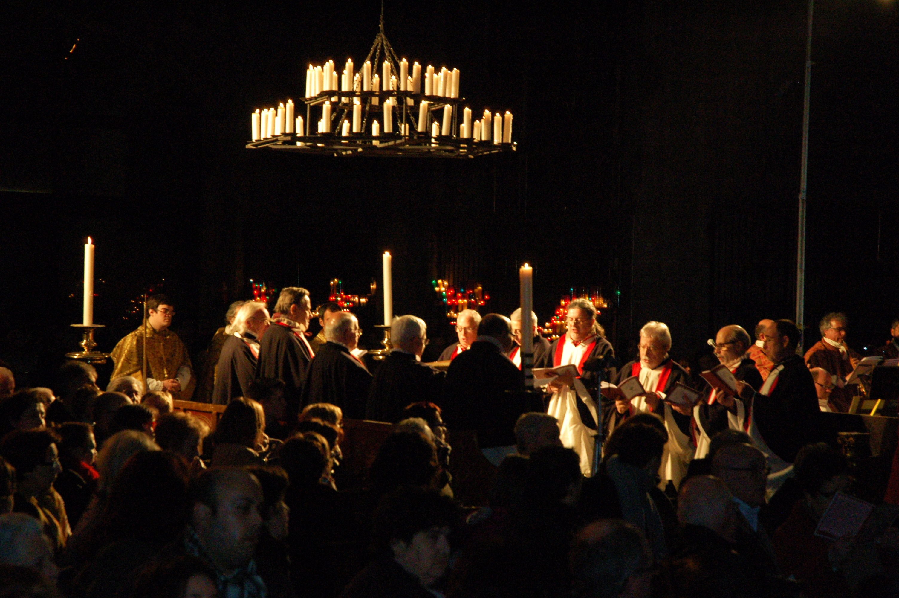 Inici de la representantació amb l'invitatori 2013